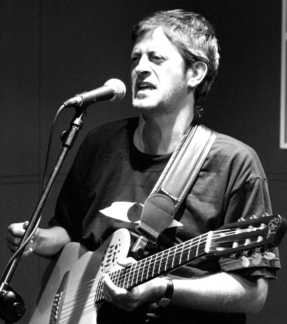 Actuació en la FNAC